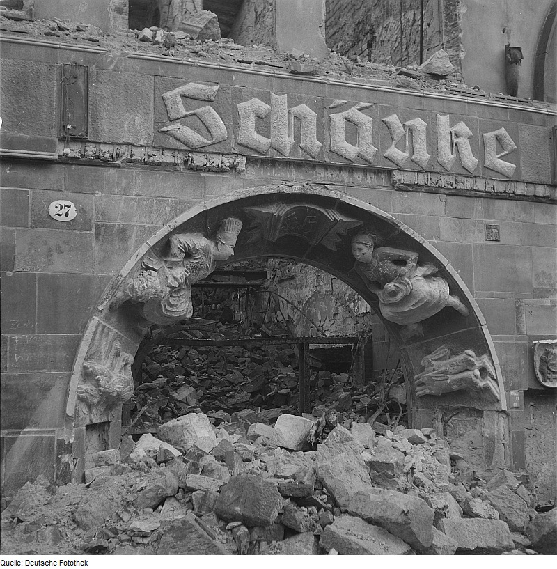 Original image description from the Deutsche Fotothek Ruine der Bärenschänke, Portalgewände mit Koch undKellnerin